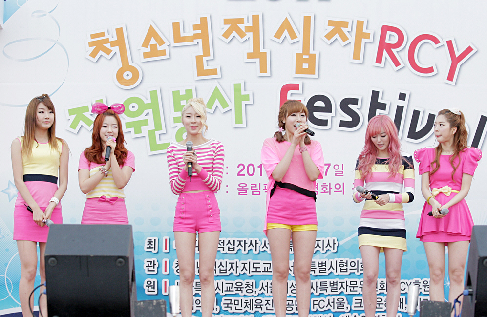 달샤벳 올림픽공원 청소년적십자 자원봉사 축하공연